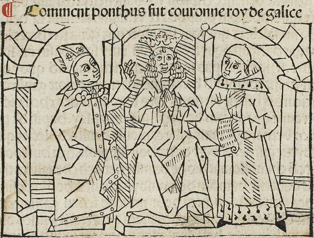 Ponto é coroado rei de Galiza en Le Roy Ponthus et la belle Sidoine (Ponthus e Sidoine, reis de Galiza e Bretaña).